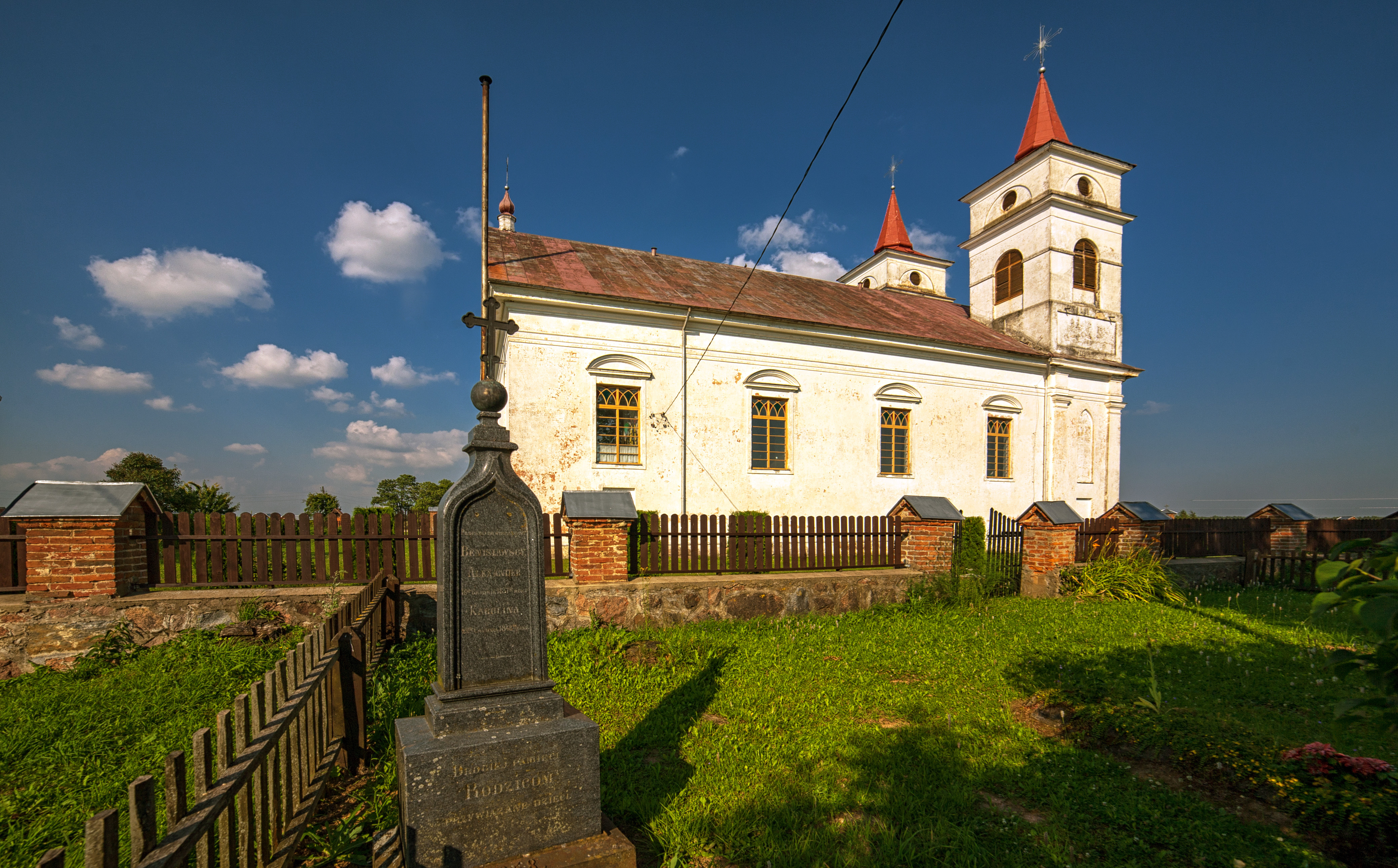 Bērzpils katoļu baznīca, Bērzpils